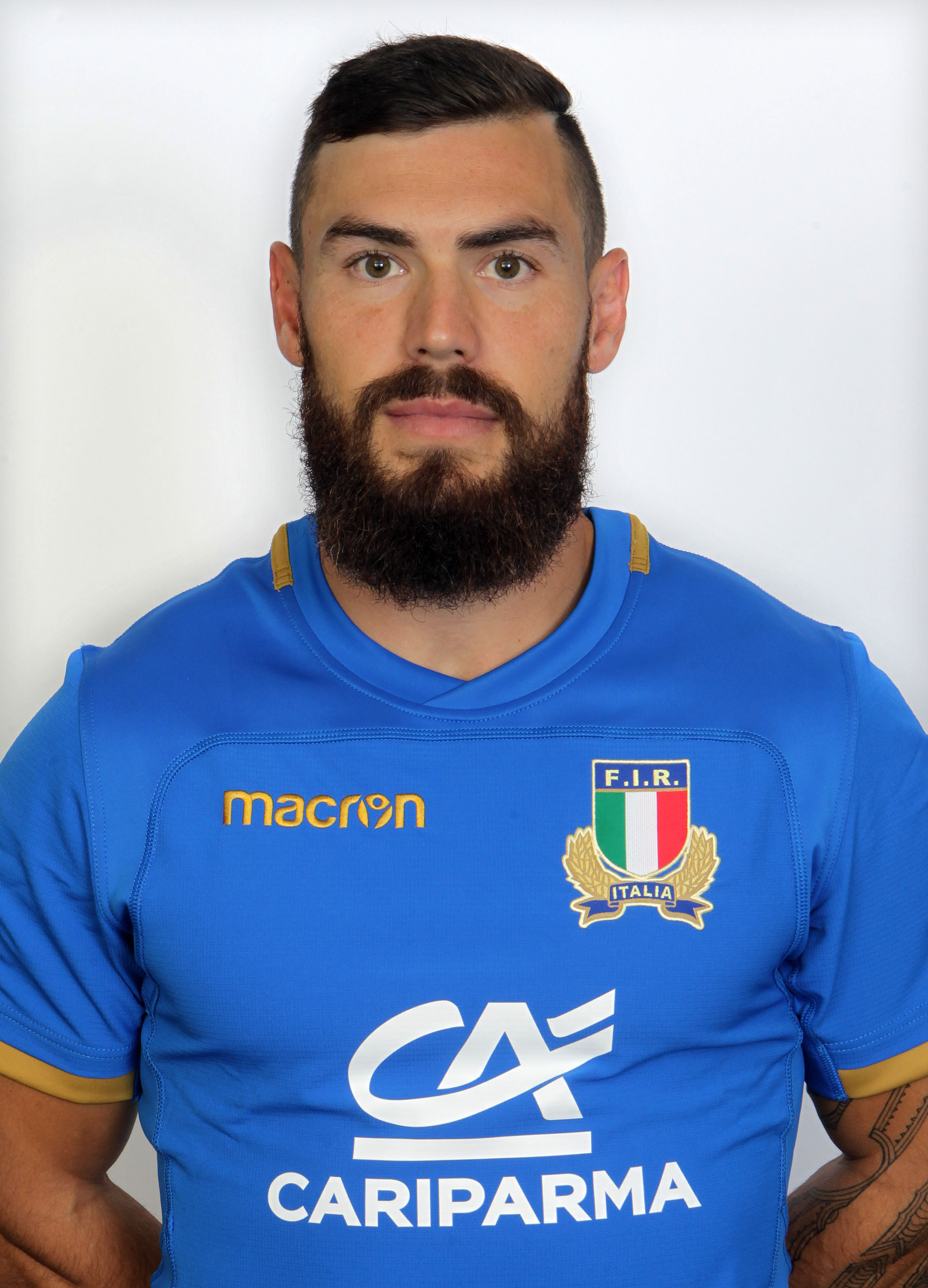 Cariparma Test match 2017, Parma 22/10/2017, raduno Nazionale italiana, profili individuali di atleti e staff, Jayden HAYWARD, centro (Benetton Rugby, esordiente).